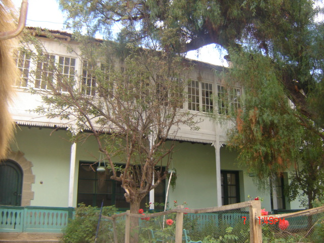 Casa de Gerencia - EMQ Qechisla